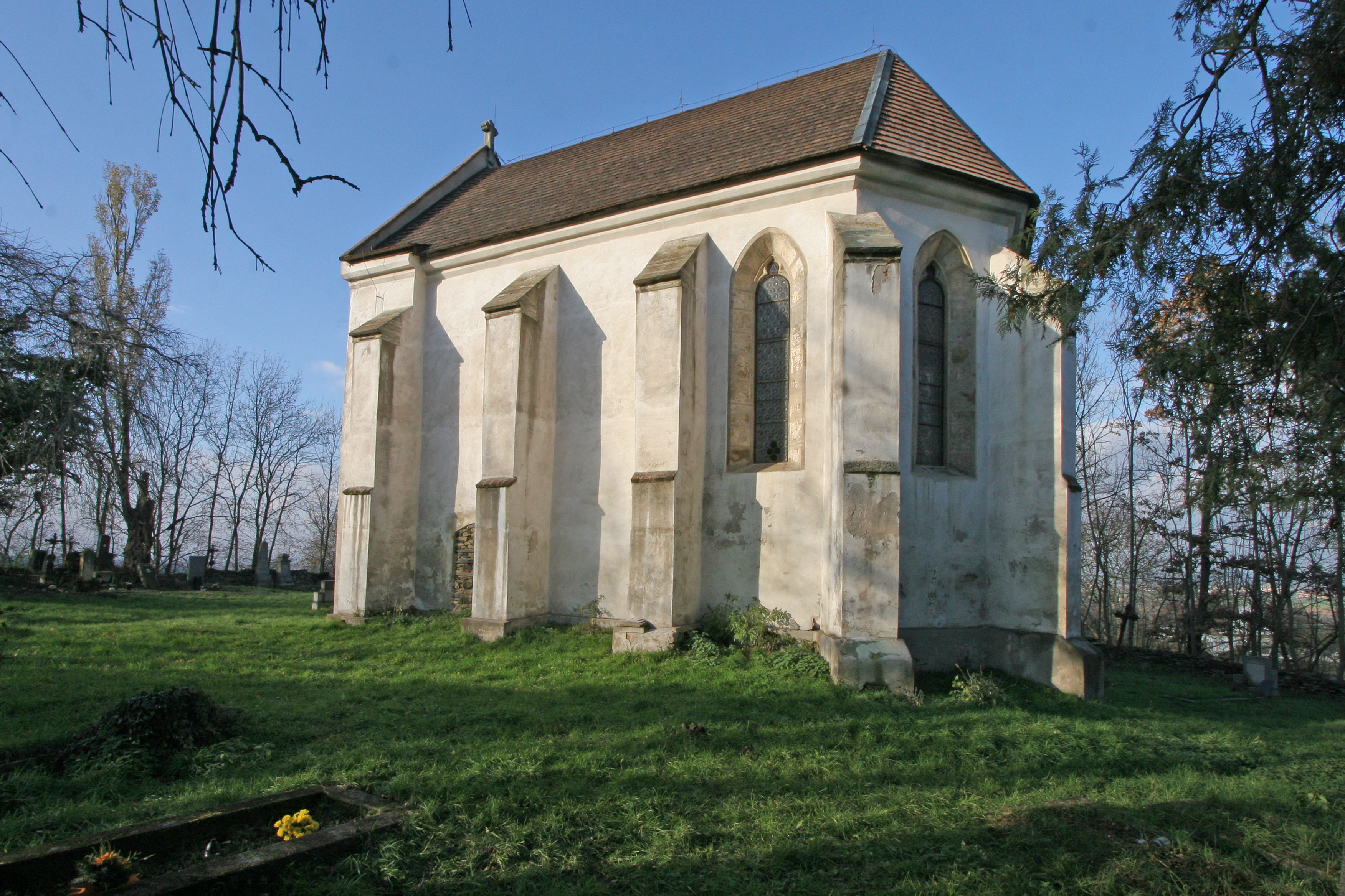 Kostel sv. Marka (Markovice), Markovice